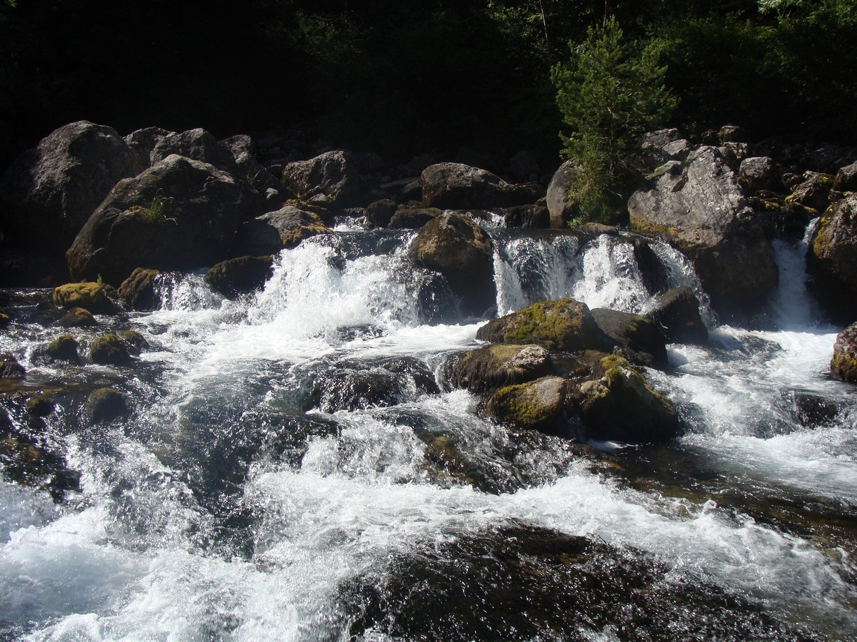 Les Grandes Gillardes en été : bien qu'on soit en saison sèche, le débit reste important.